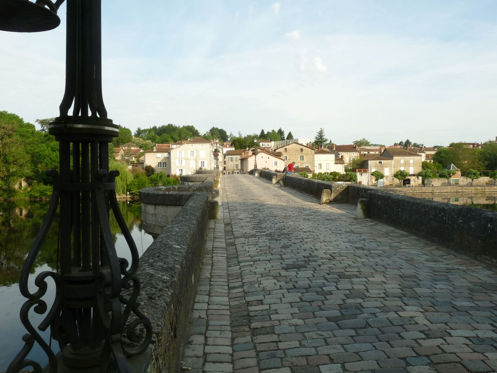 Pont-Vieux, Confolens (Charente, France)